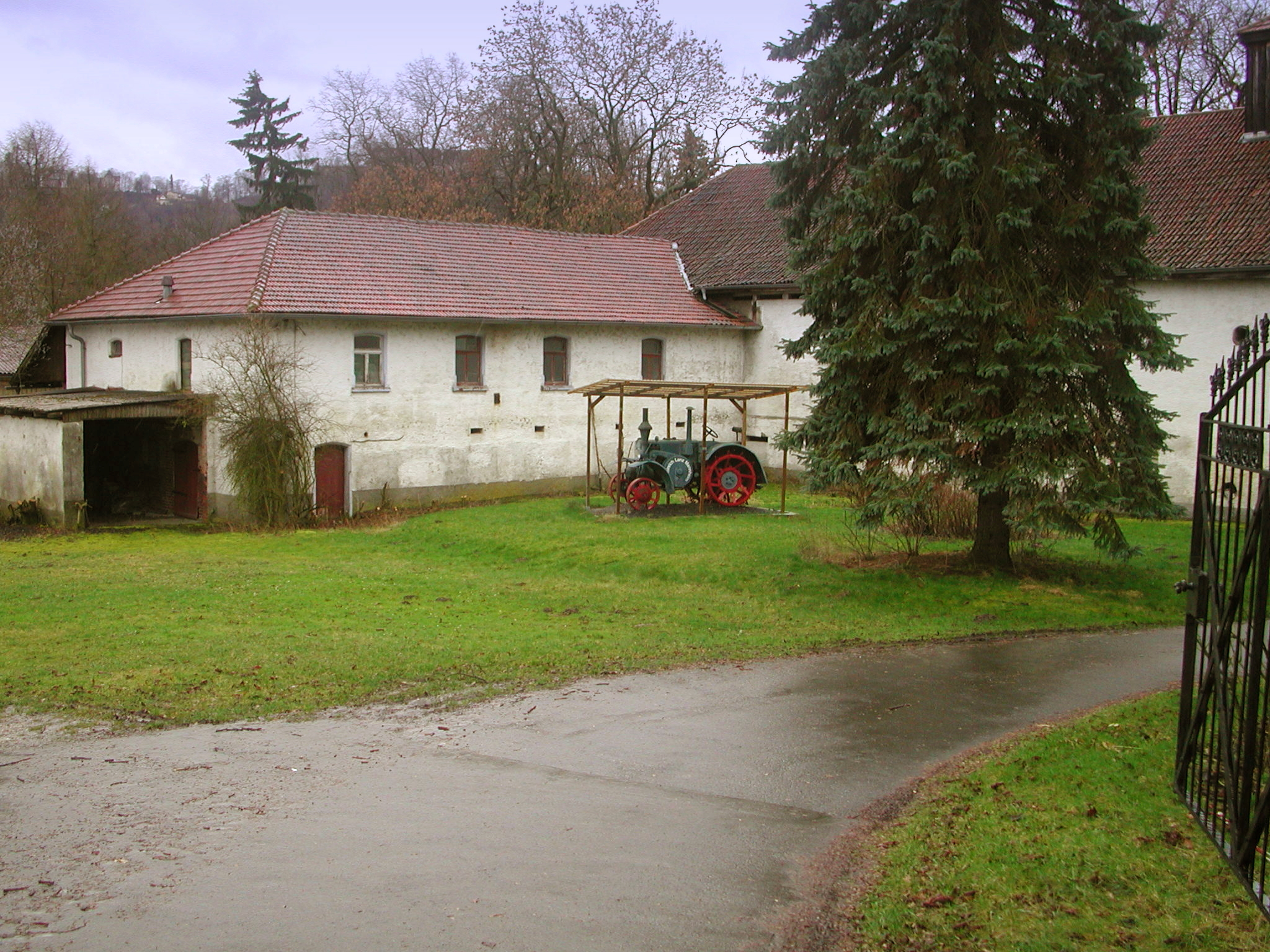 Gutshof Neudörfles in Coburg, Ökonomiegebäude